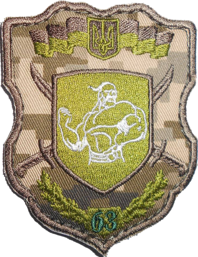 Нарукавний знак, 63 окрема механізована бригада